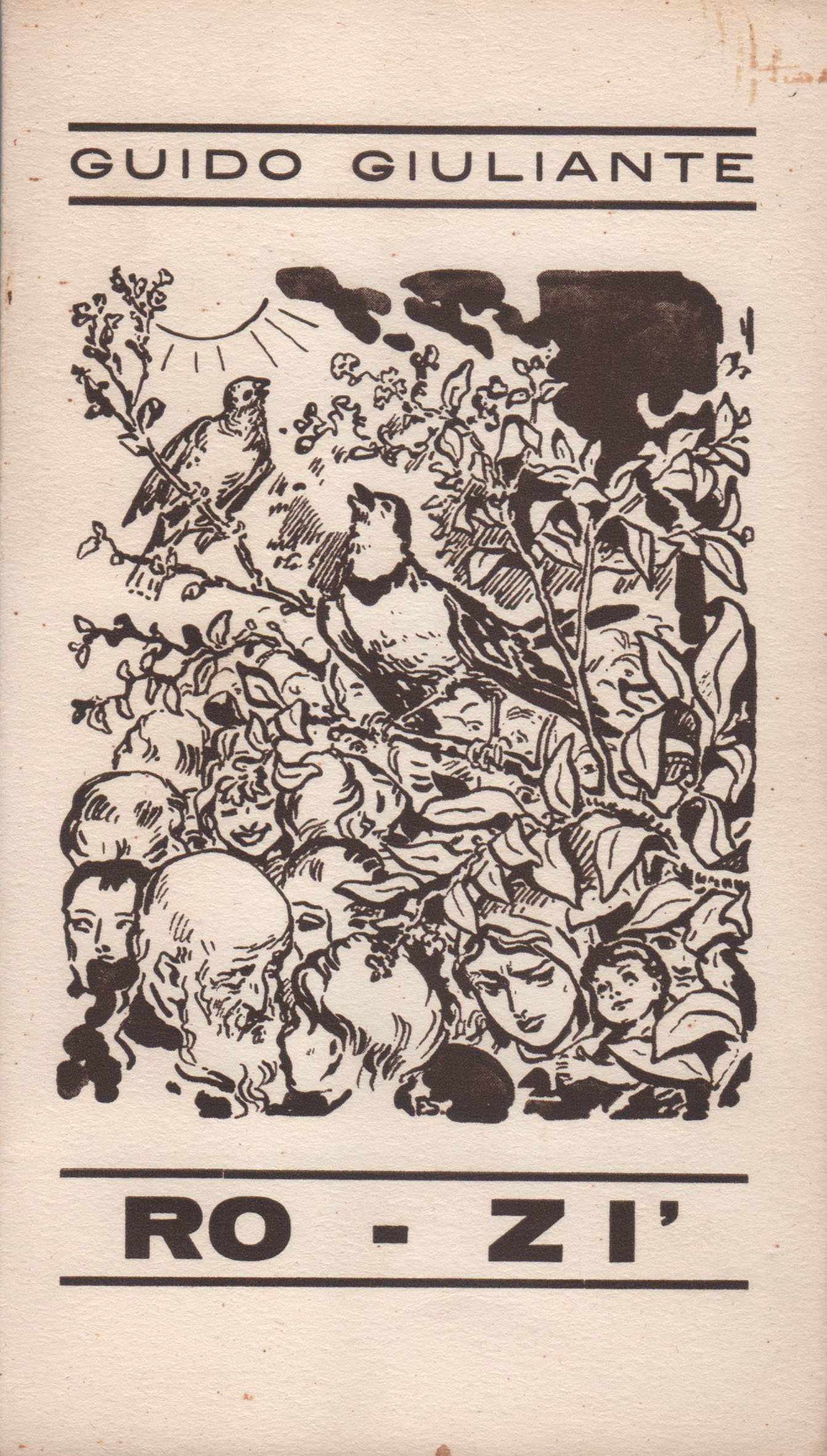 Immagine fotografata dall'album di famiglia che ne ha autorizzato l'uso.